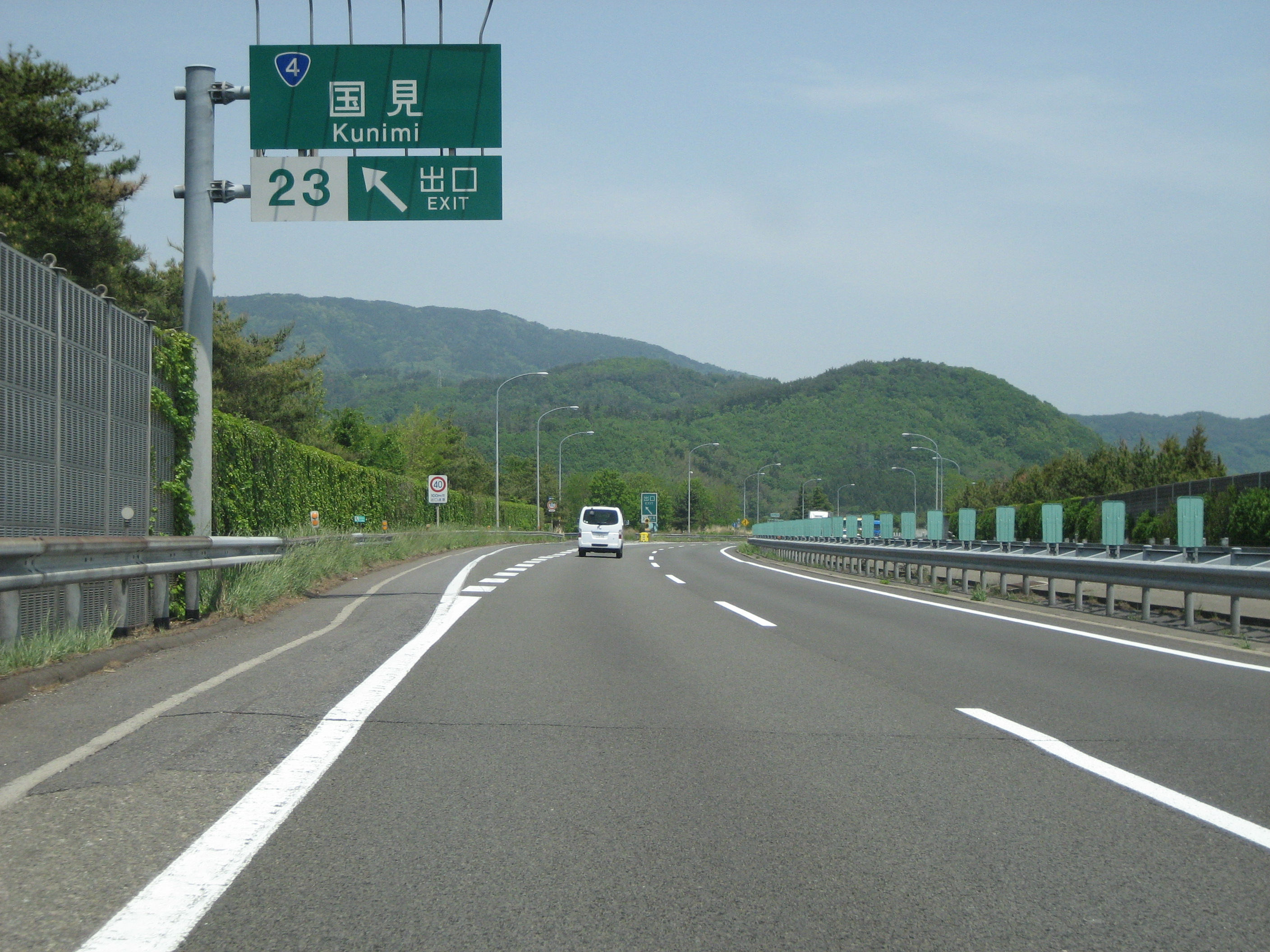 東北自動車道国見IC（下り出口分流付近）